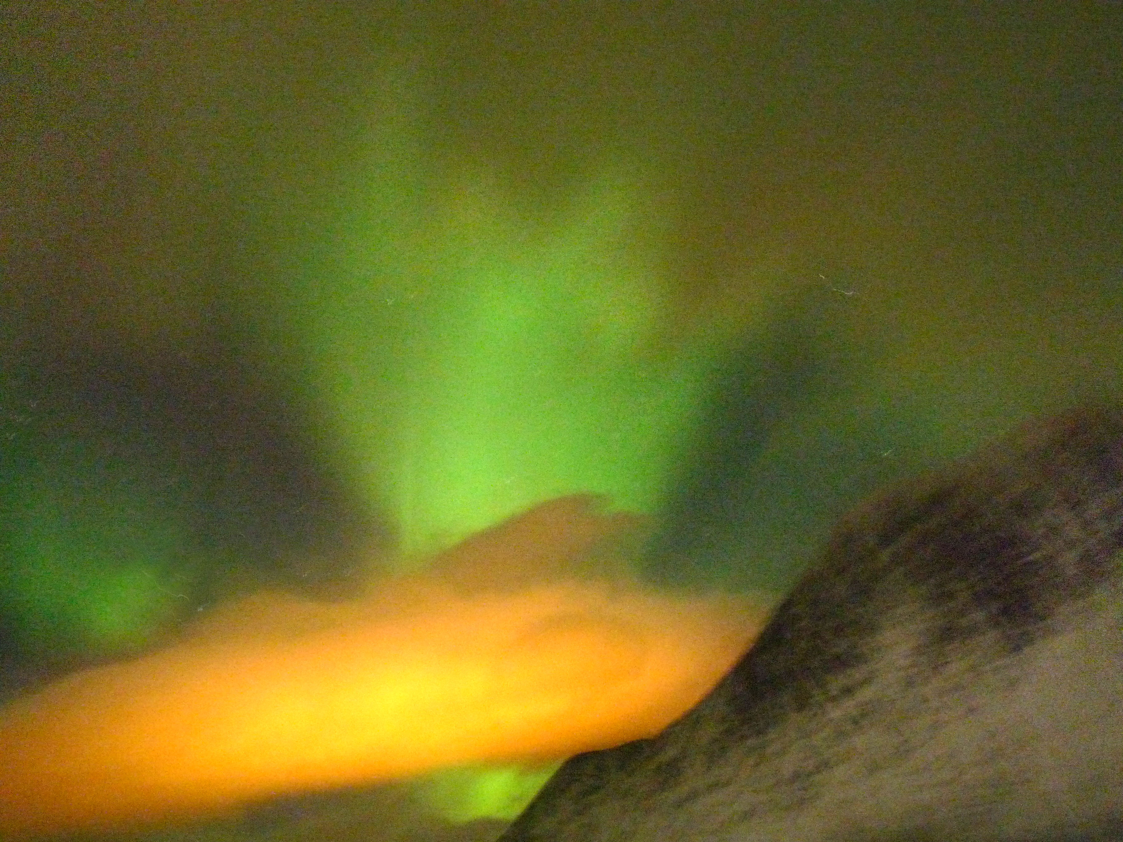 N Lights Skjervøy 06